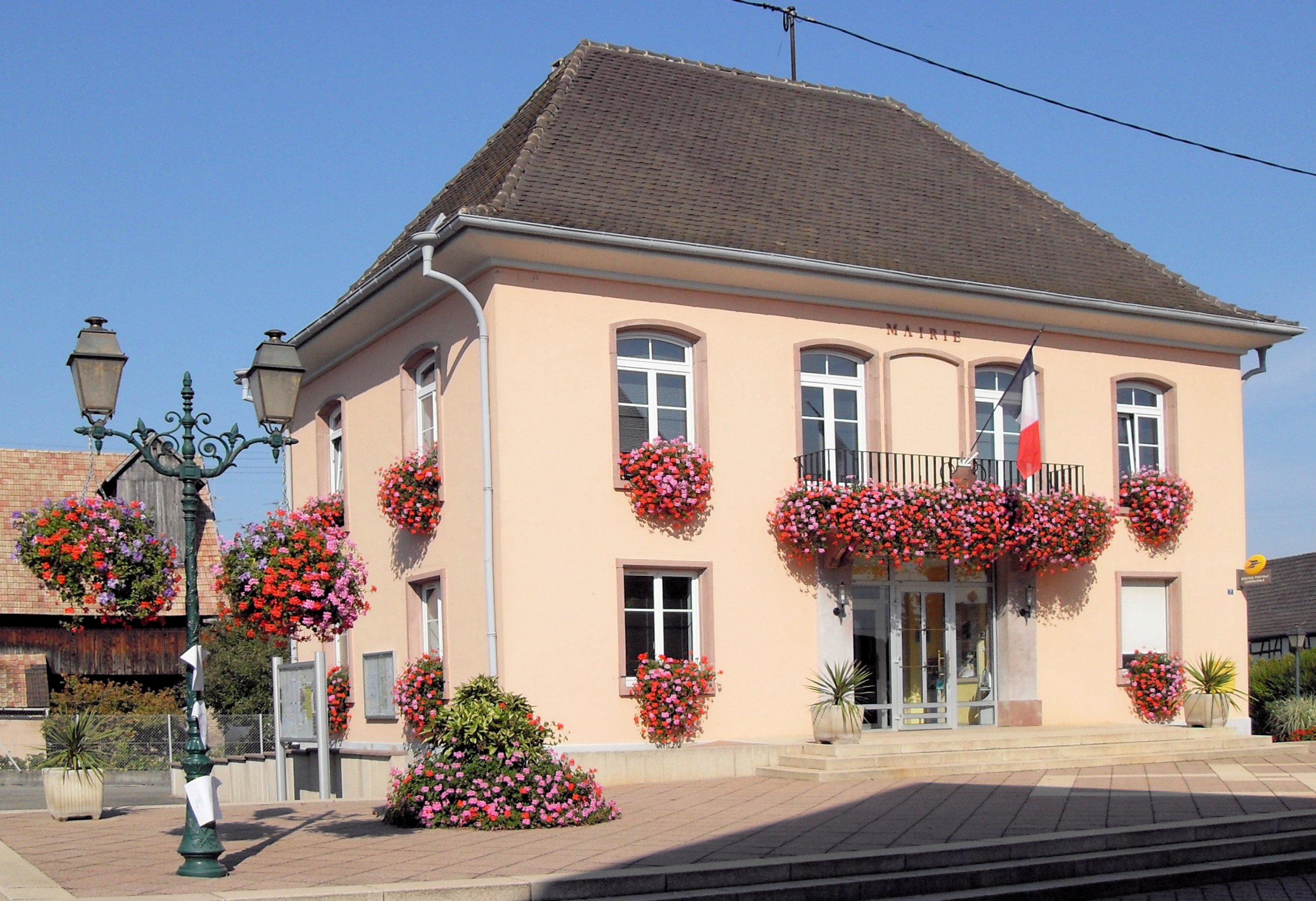 La mairie de Schœnau